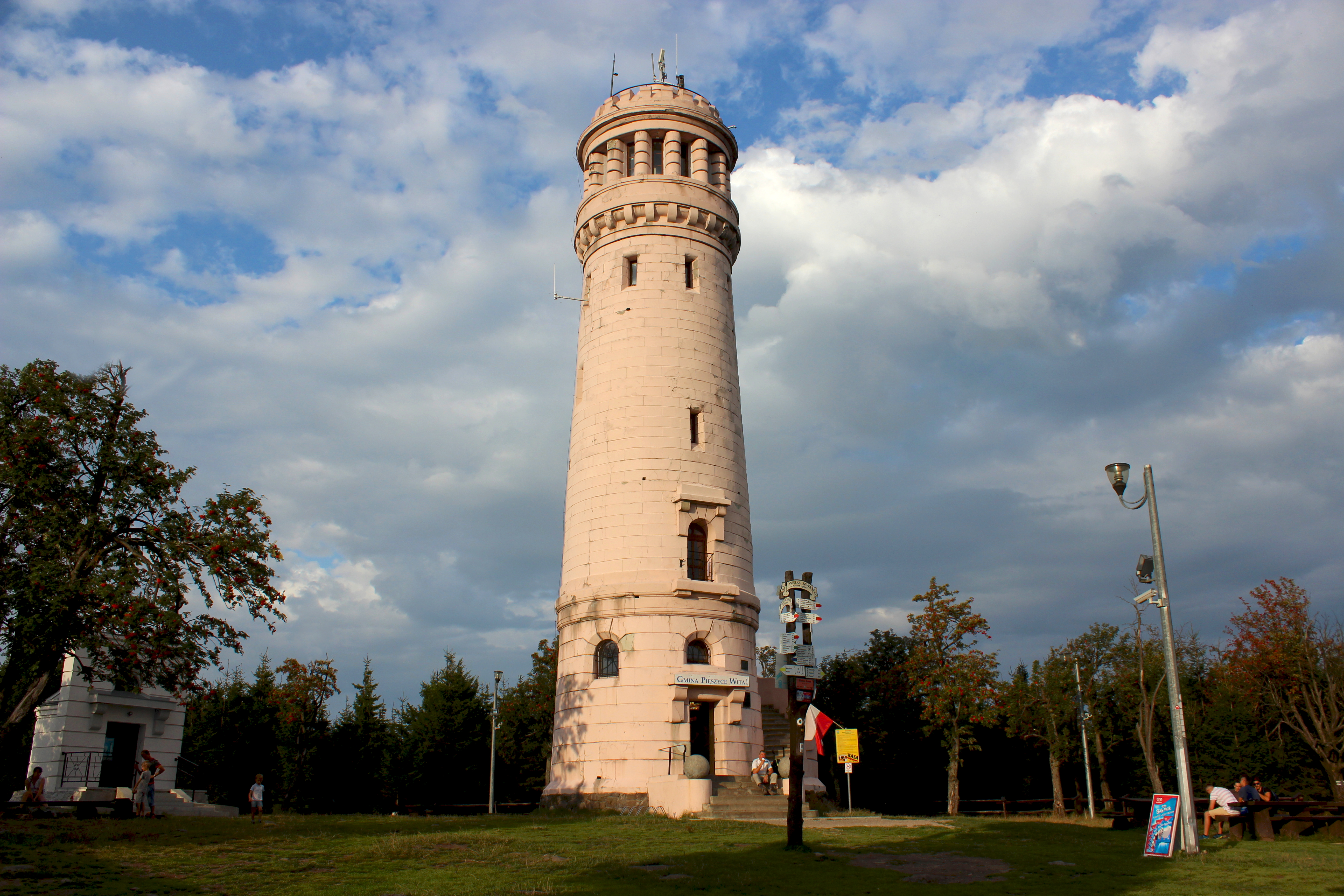 Wieża widokowa na Wielkiej Sowie w gminie Pieszyce